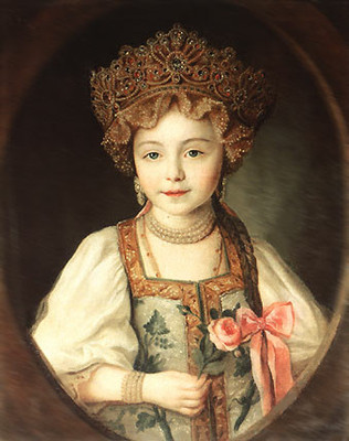 Великая княжна Александра Павловна в русском народном костюме 1790-е годы. Неизвестный художник. Гатчина.